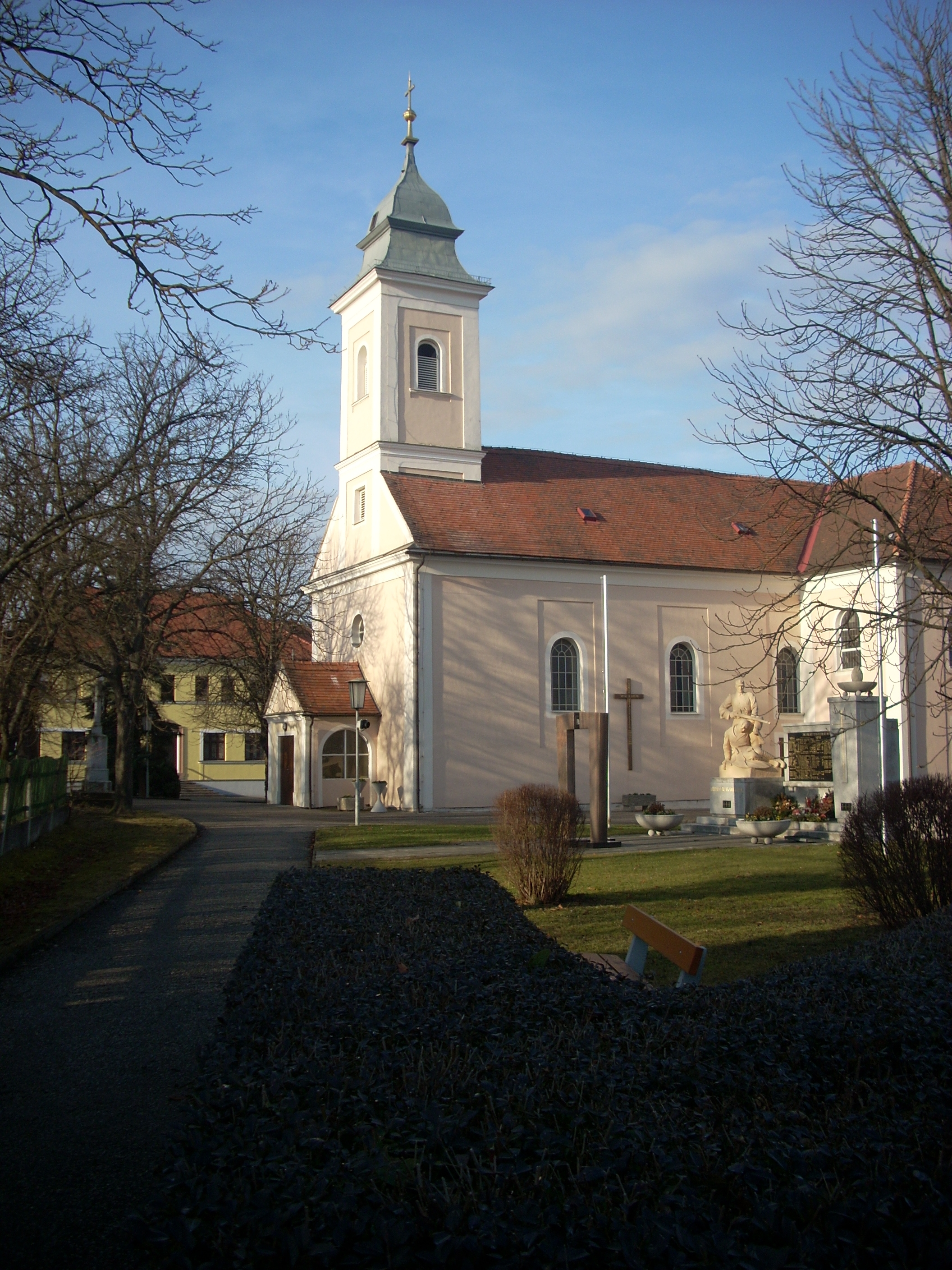 Foto der Pfarrkirche Stinatz